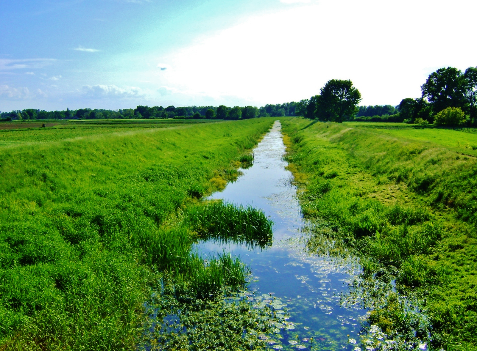 Заштићени природни предио - Мочварни комплекс Бардача, Србац ID добра: ZPP017